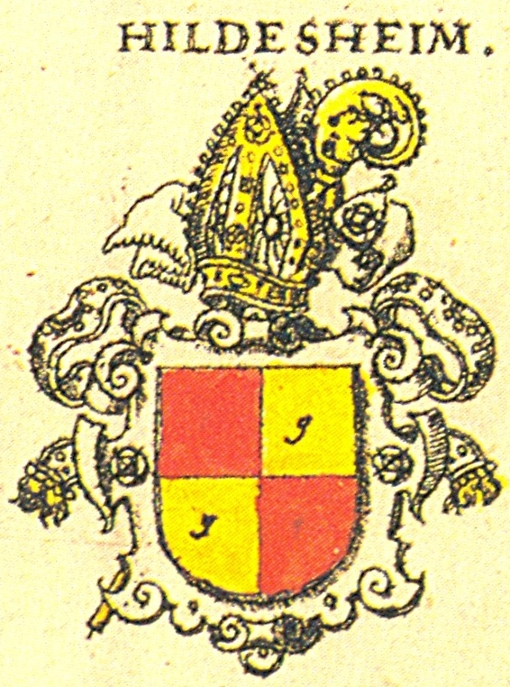 Wappen des Bistums Hildesheim nach Siebmachers Wappenbuch